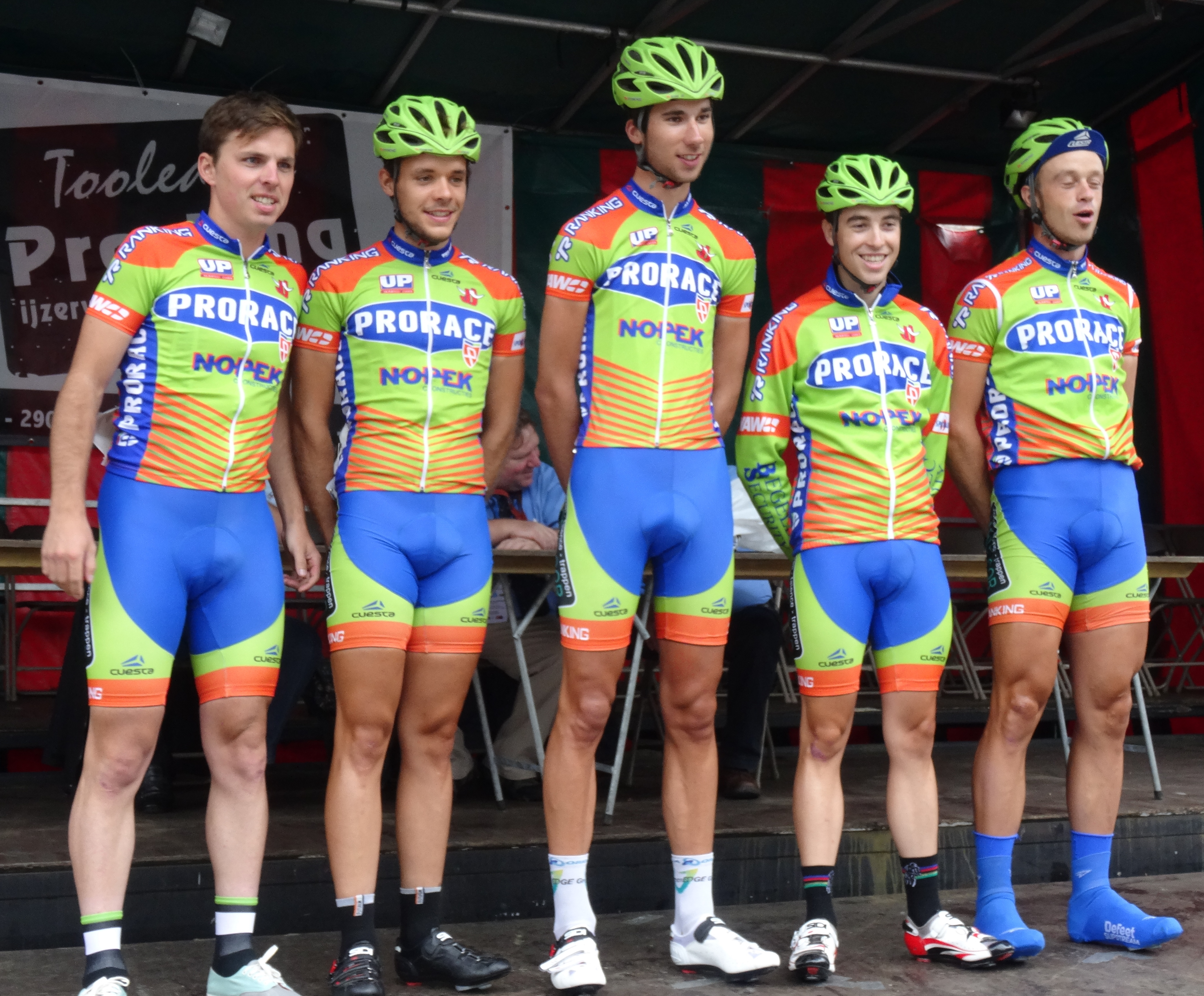 Reportage photographique réalisé le dimanche 10 août à l'occasion du départ et de l'arrivée de la Flèche du port d'Anvers 2014 à Merksem (Anvers), Belgique.